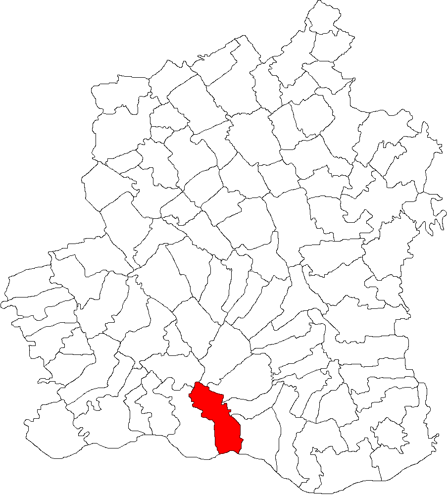 Categorie:Hărţi ale judeţului Teleorman